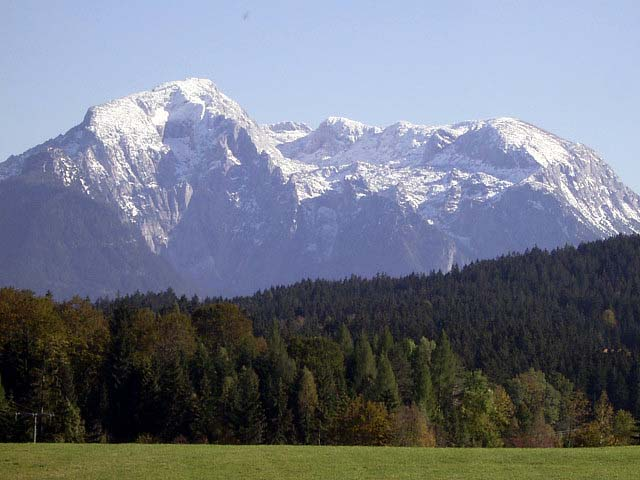 Göll in den Berchtesgadener Alpen mit Hoher Göll, Kehlstein, Hohes Brett von Westen